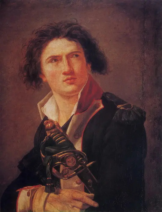 Général Lazare Hoche (1768-1797)